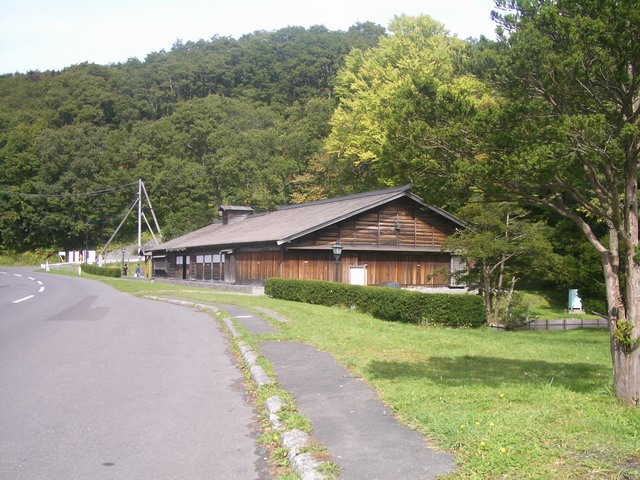 北広島市国道36号線旧道にある旧島松駅逓所。投稿者自身で撮影。Former Shimamatsu Station Facilities, Kitahiroshima, Hokkaido, Japan